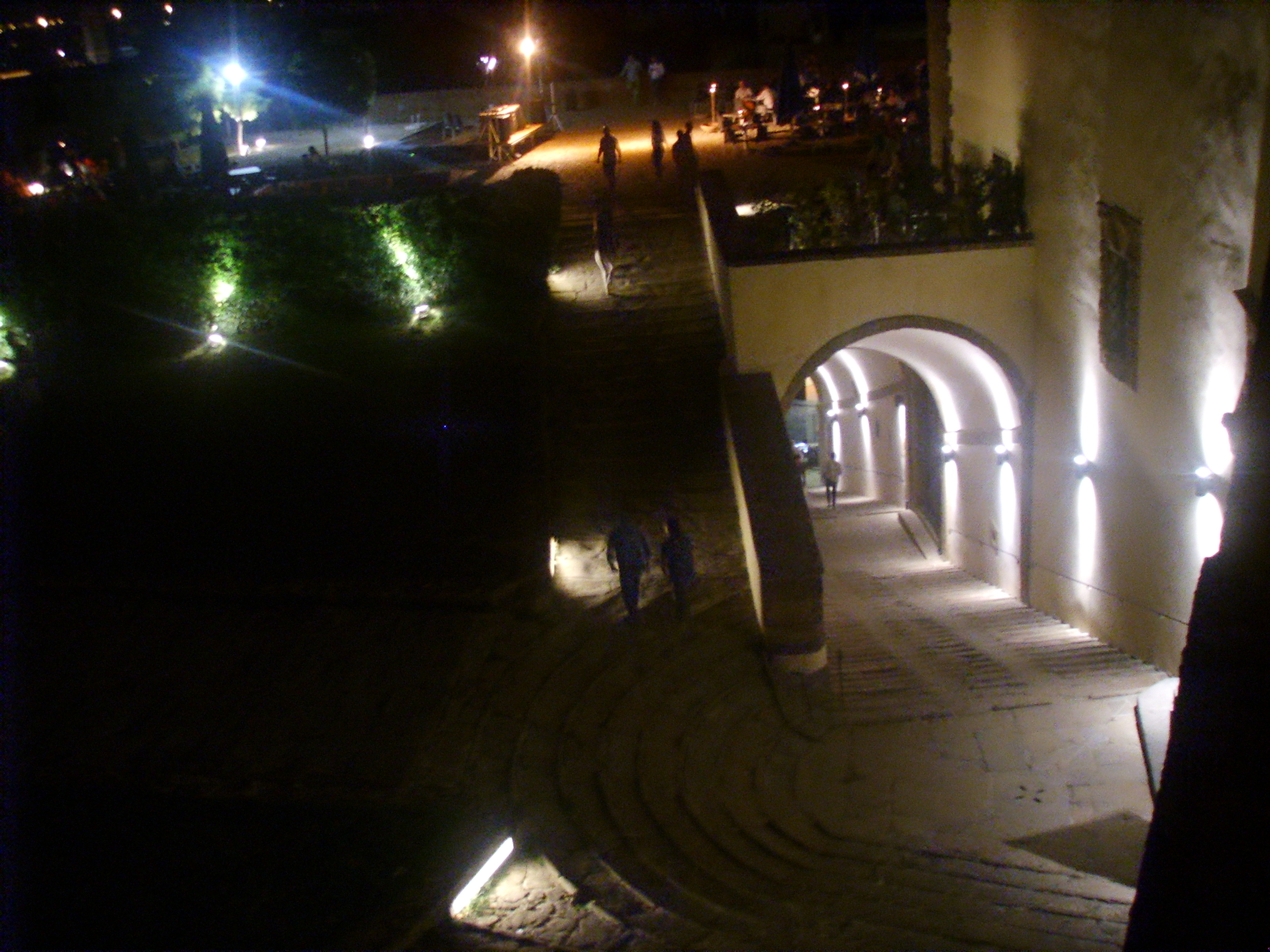 Forte_Belvedere by night